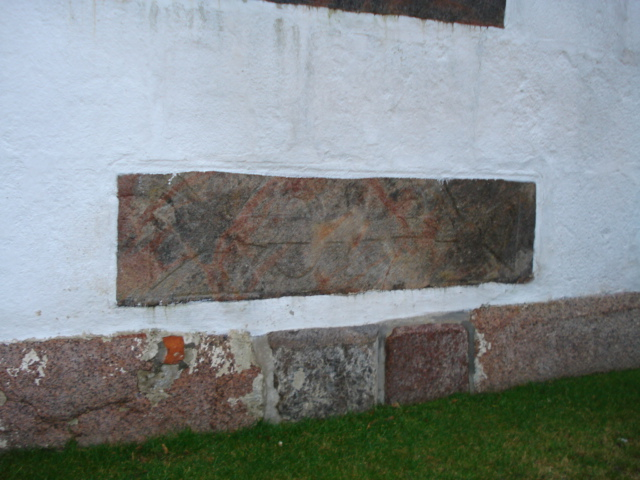 Oering Kirke / Oerting Church, Jutland, Denmark